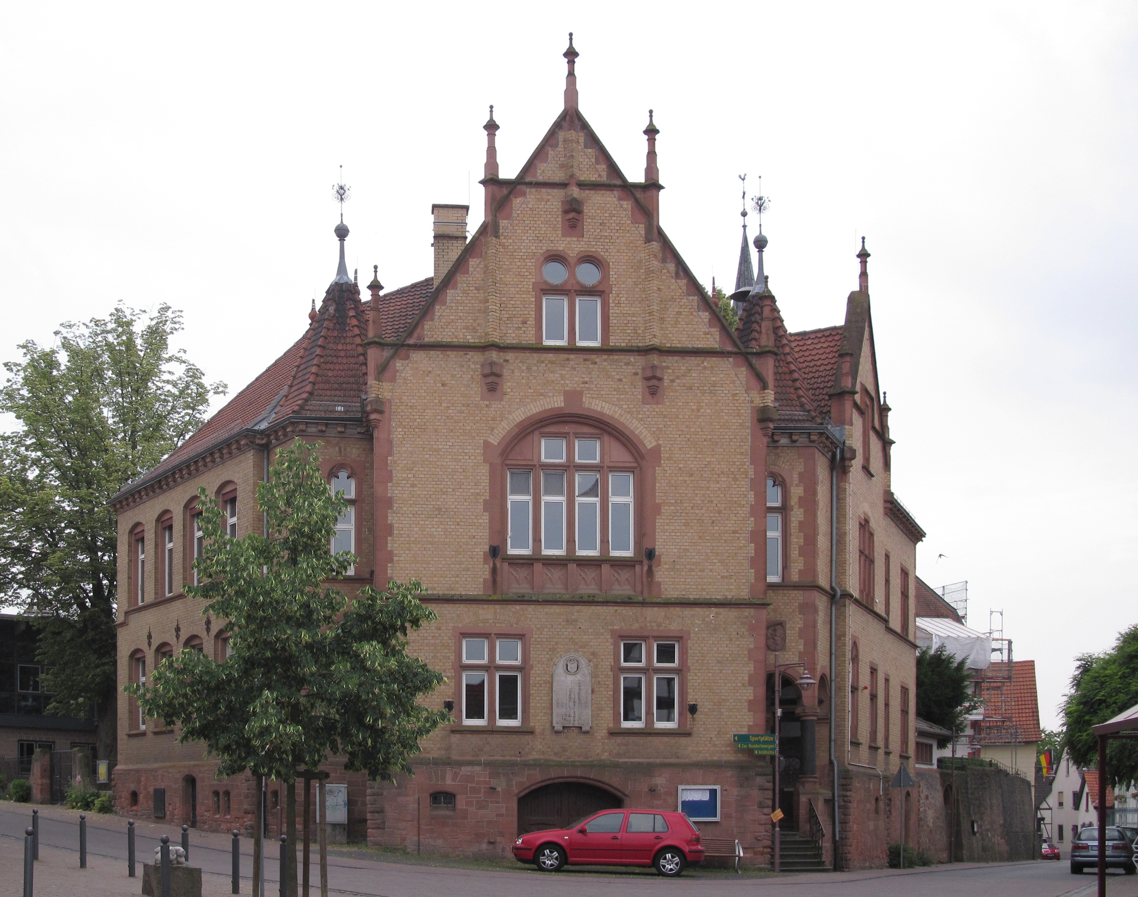 "Rotes Rathaus" in Reinheim-Überau